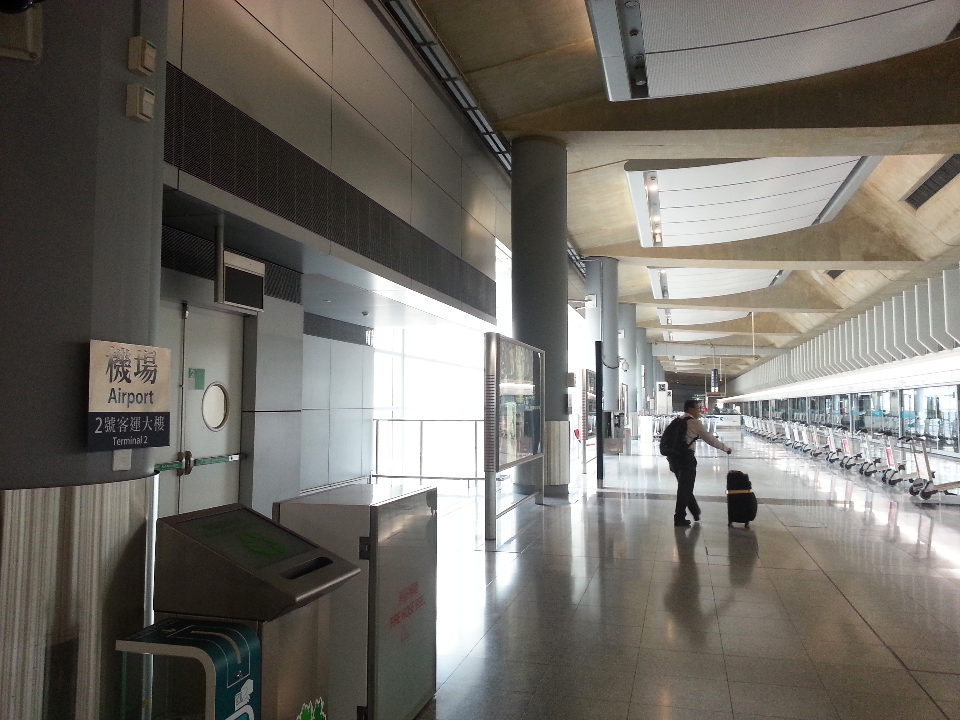 港鐵機場站月台